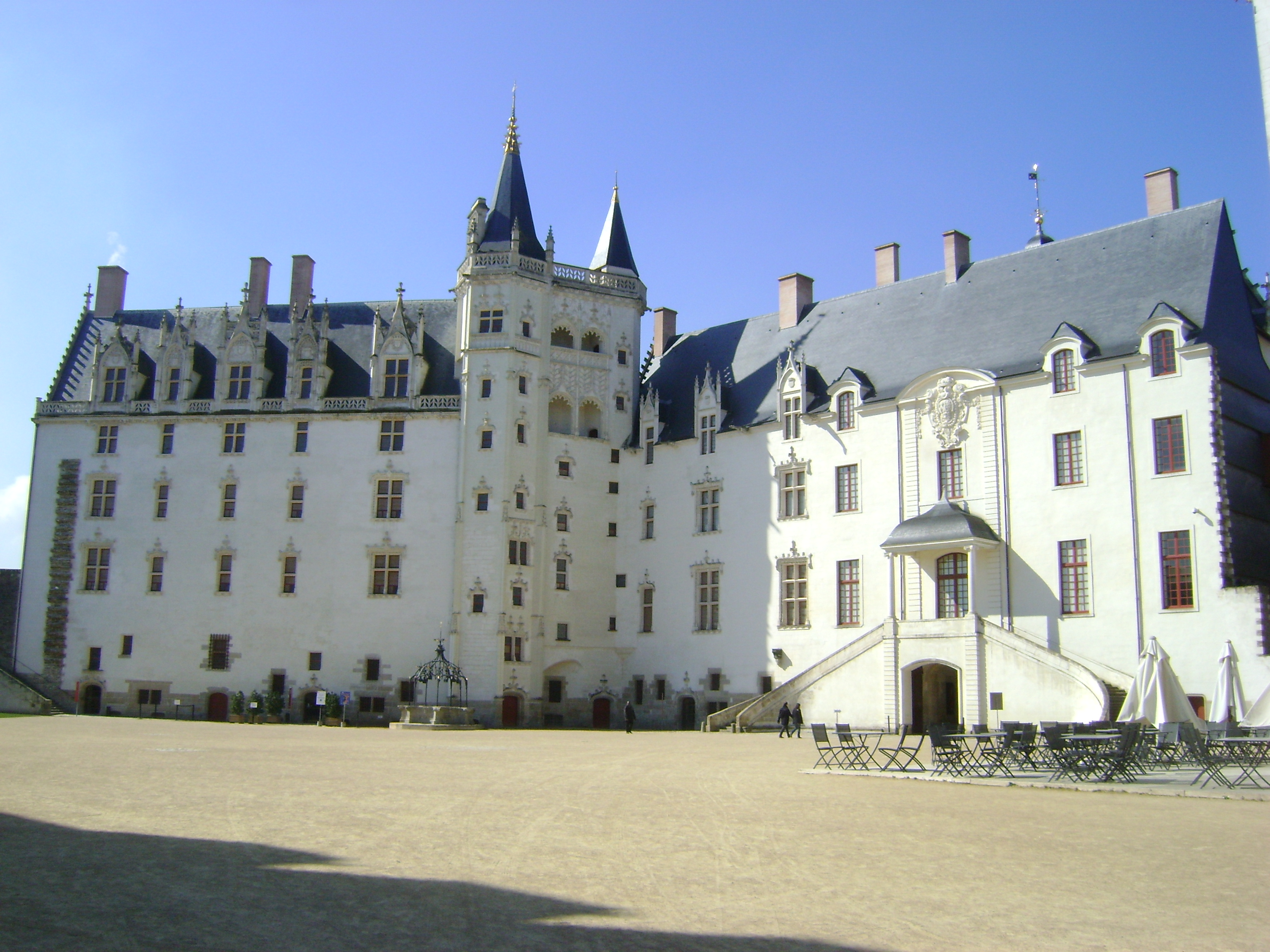 Château des Ducs de Bretagne, Nantes. Le Grand Logis, la Tour de la Couronne d'Or et le Grand Gouvernement. .